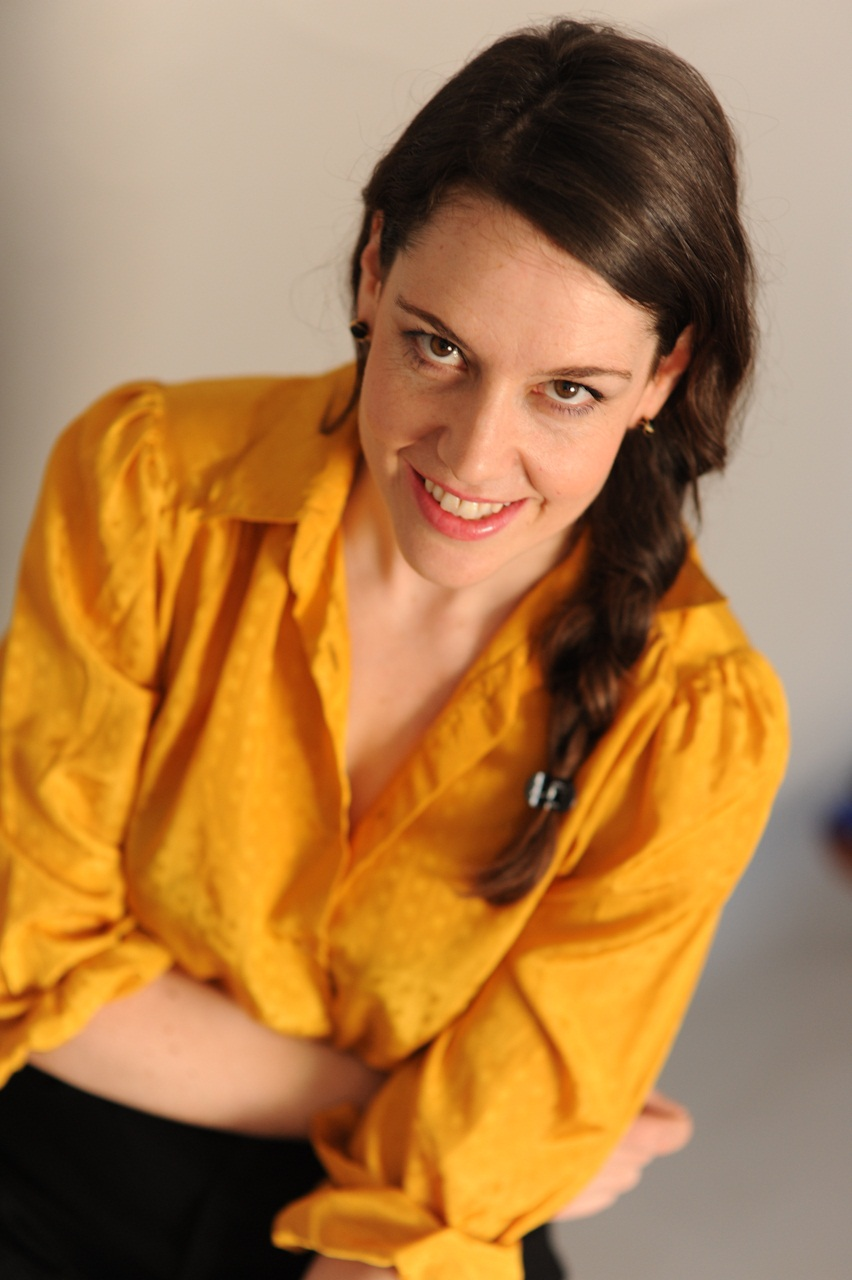 קרן אור